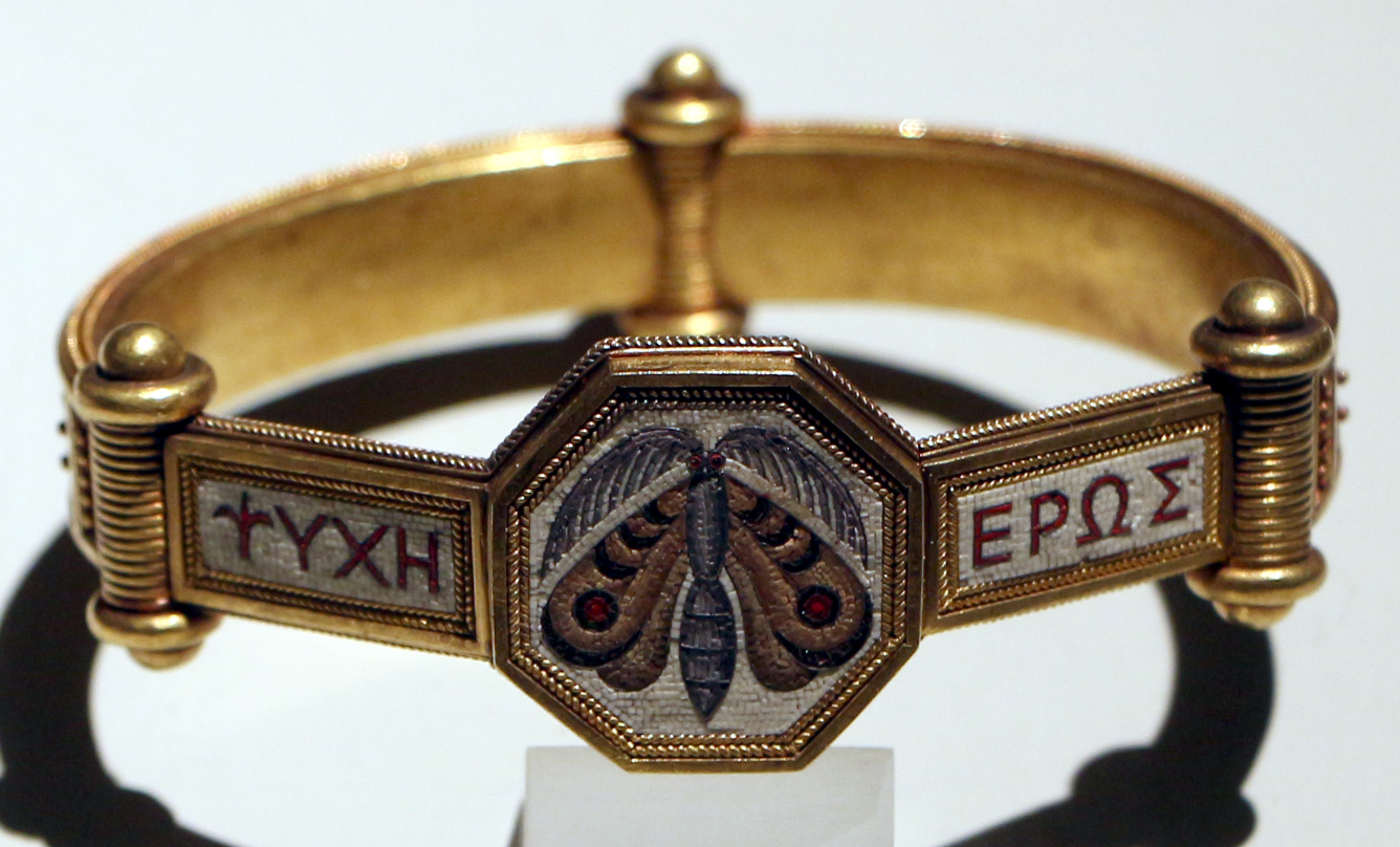 Museo nazionale etrusco di Villa Giulia This is a photo of a monument which is part of cultural heritage of Italy.